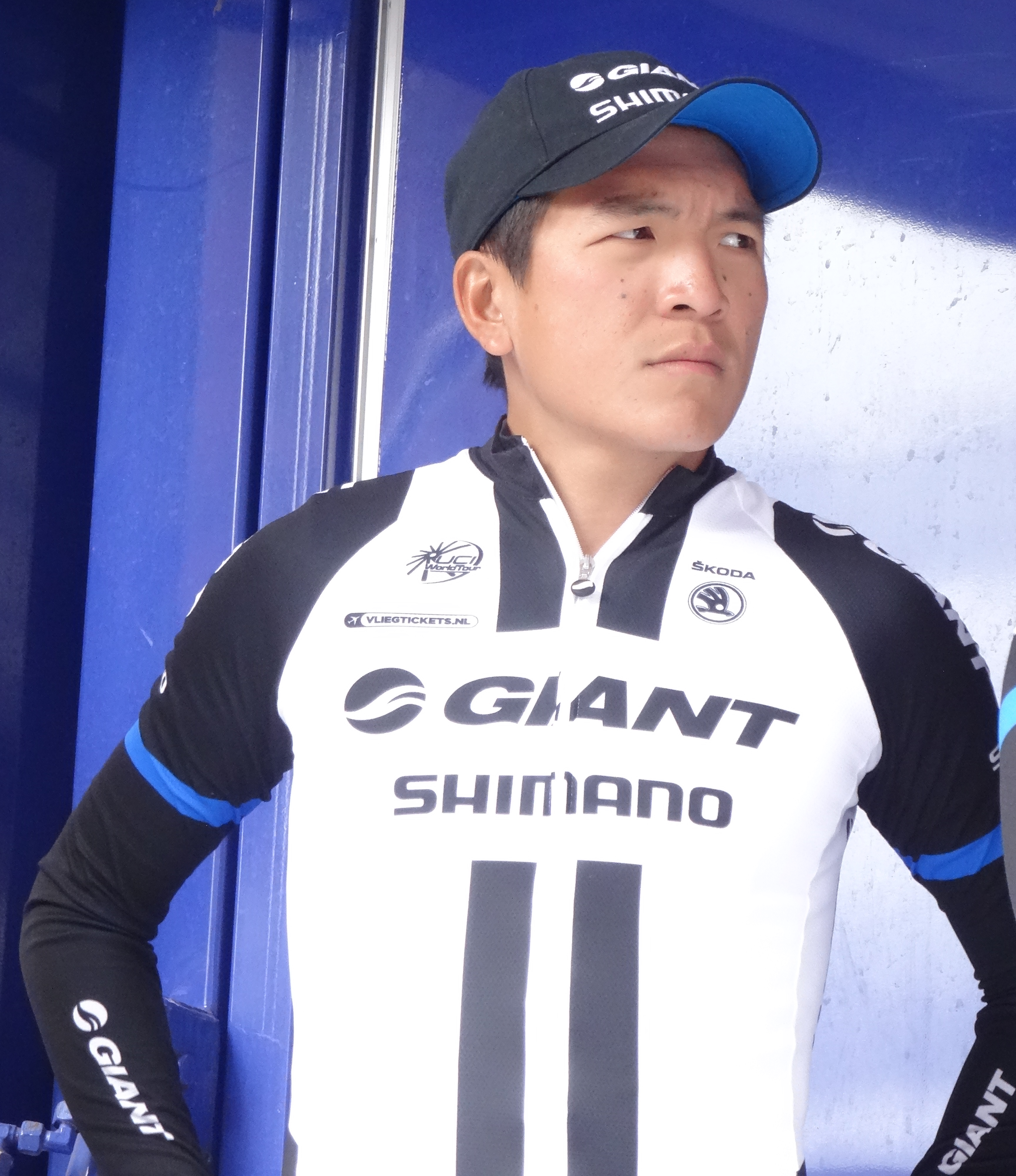 Reportage photographique réalisé le mercredi 7 mai 2014 au départ de la première étape de l'édition 2014 des Quatre jours de Dunkerque à Dunkerque, Nord, Nord-Pas-de-Calais, France. Depicted person: Loh Sea Keong Depicted team: Giant-Shimano